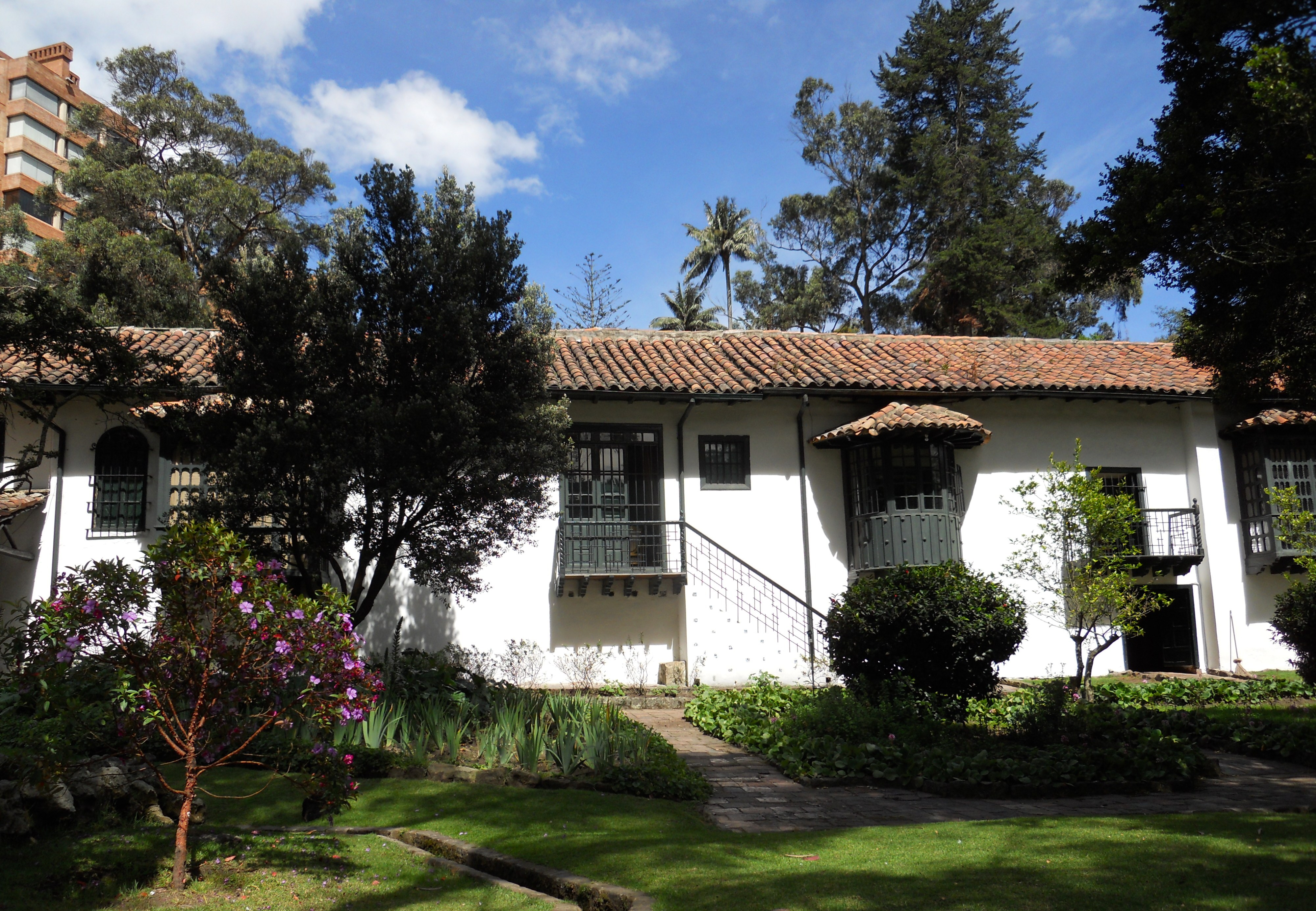 Casa Museo del Chicó. Bogotá